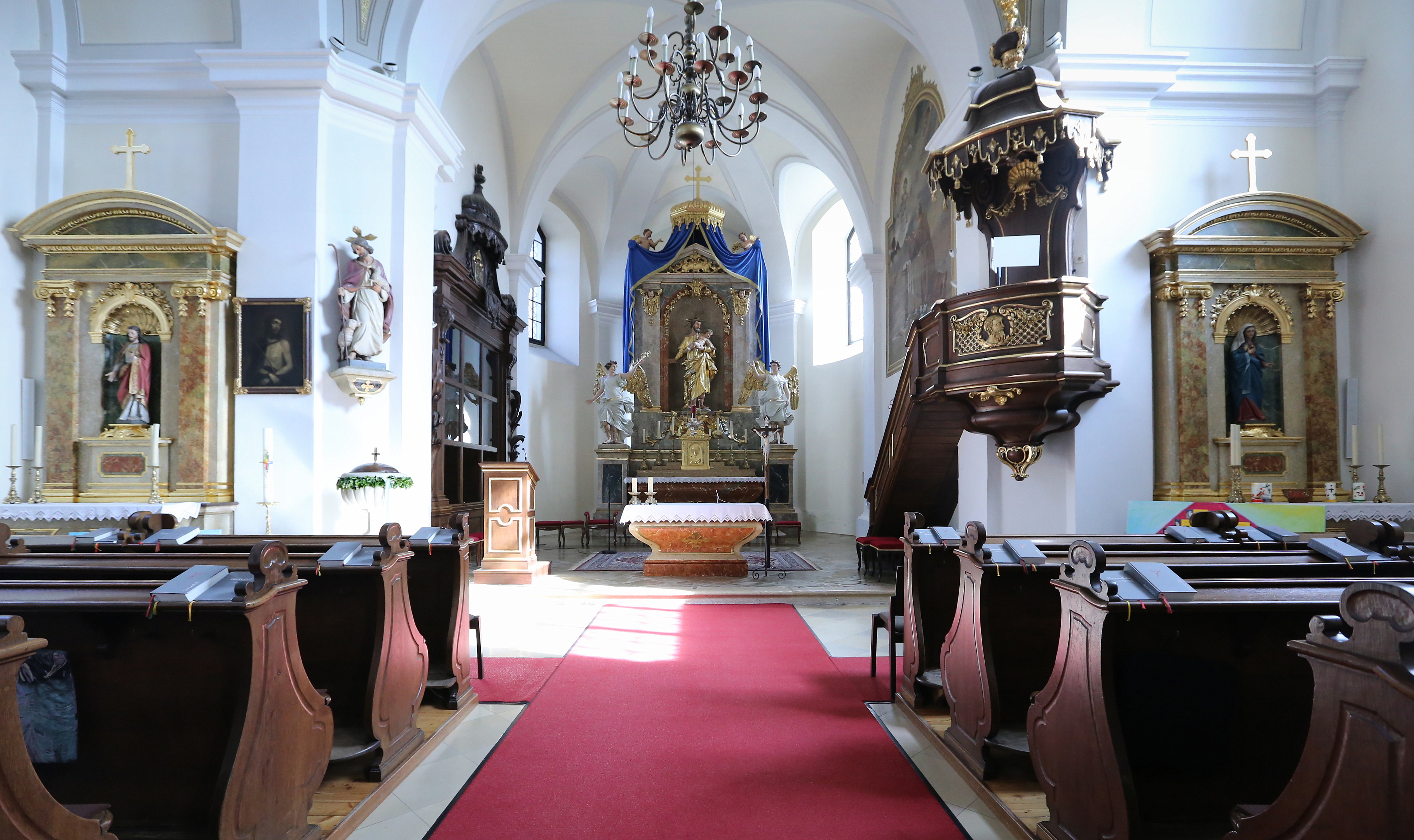 Szent József templom, Féltorony